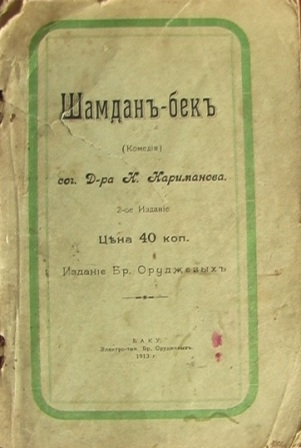 Шамдан-бек